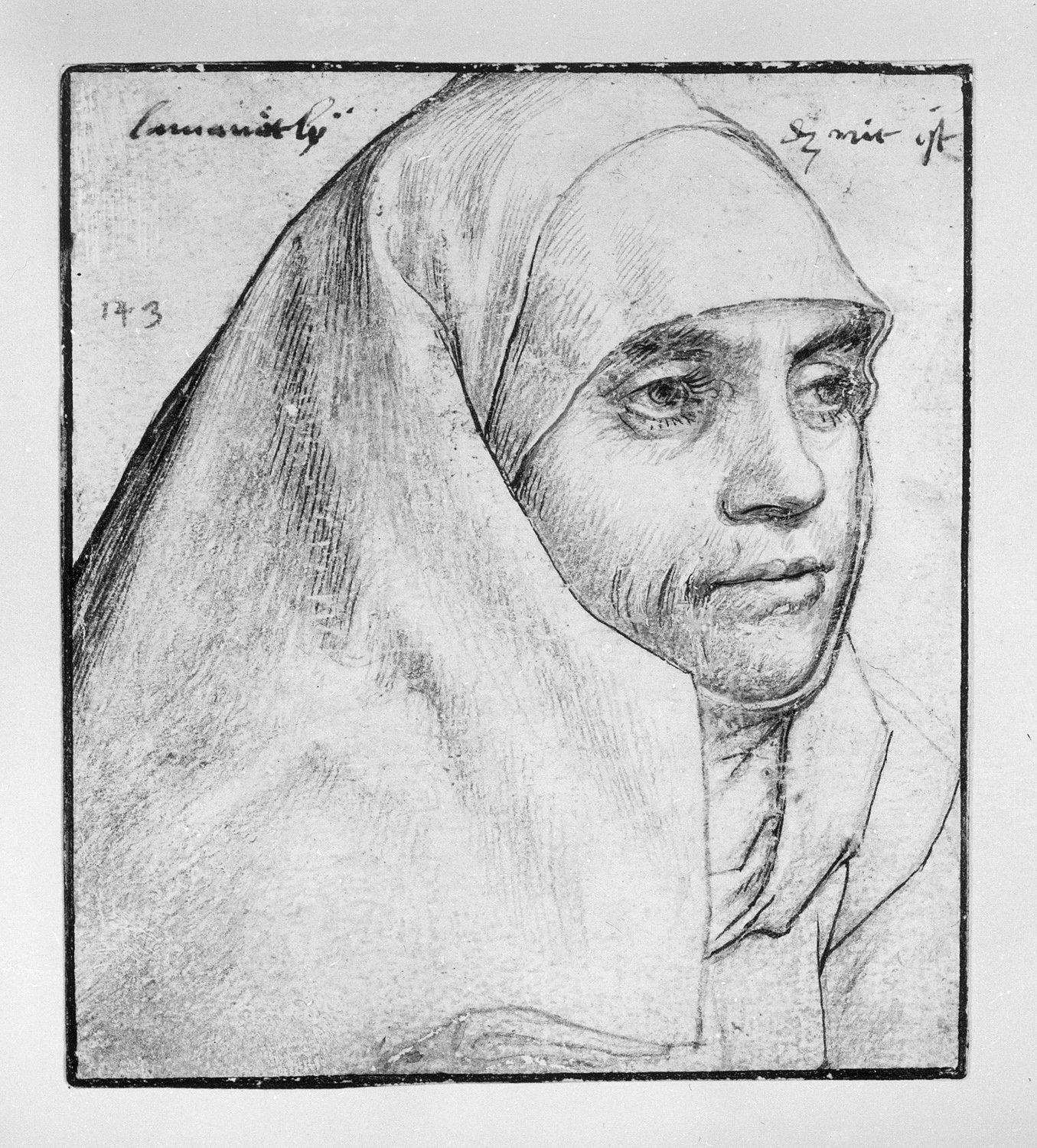 Anna Laminit, Silberstiftzeichnung